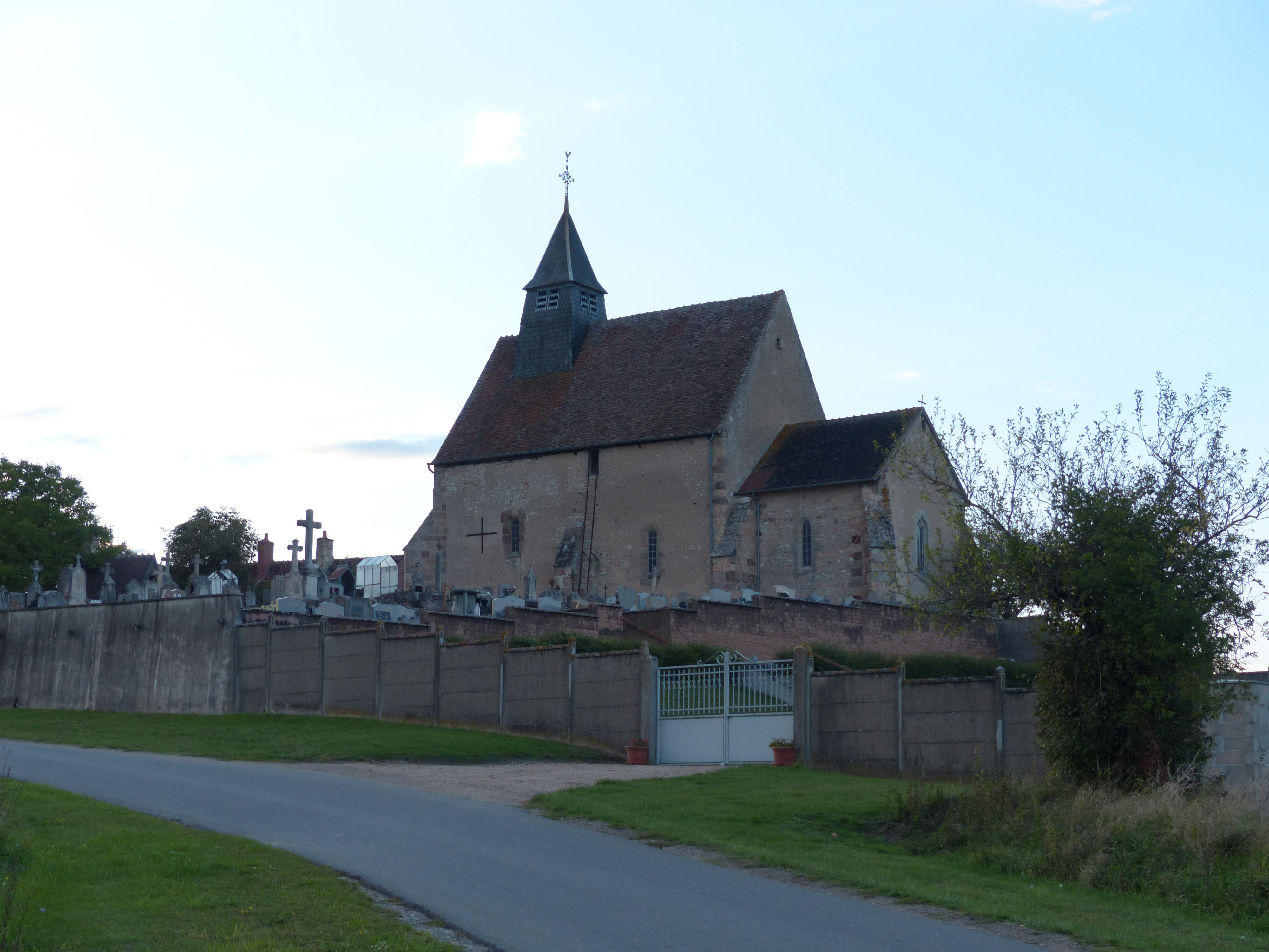 Faverdines (Cher). Site de l'église Saint-Aignan, entourée du cimetière.